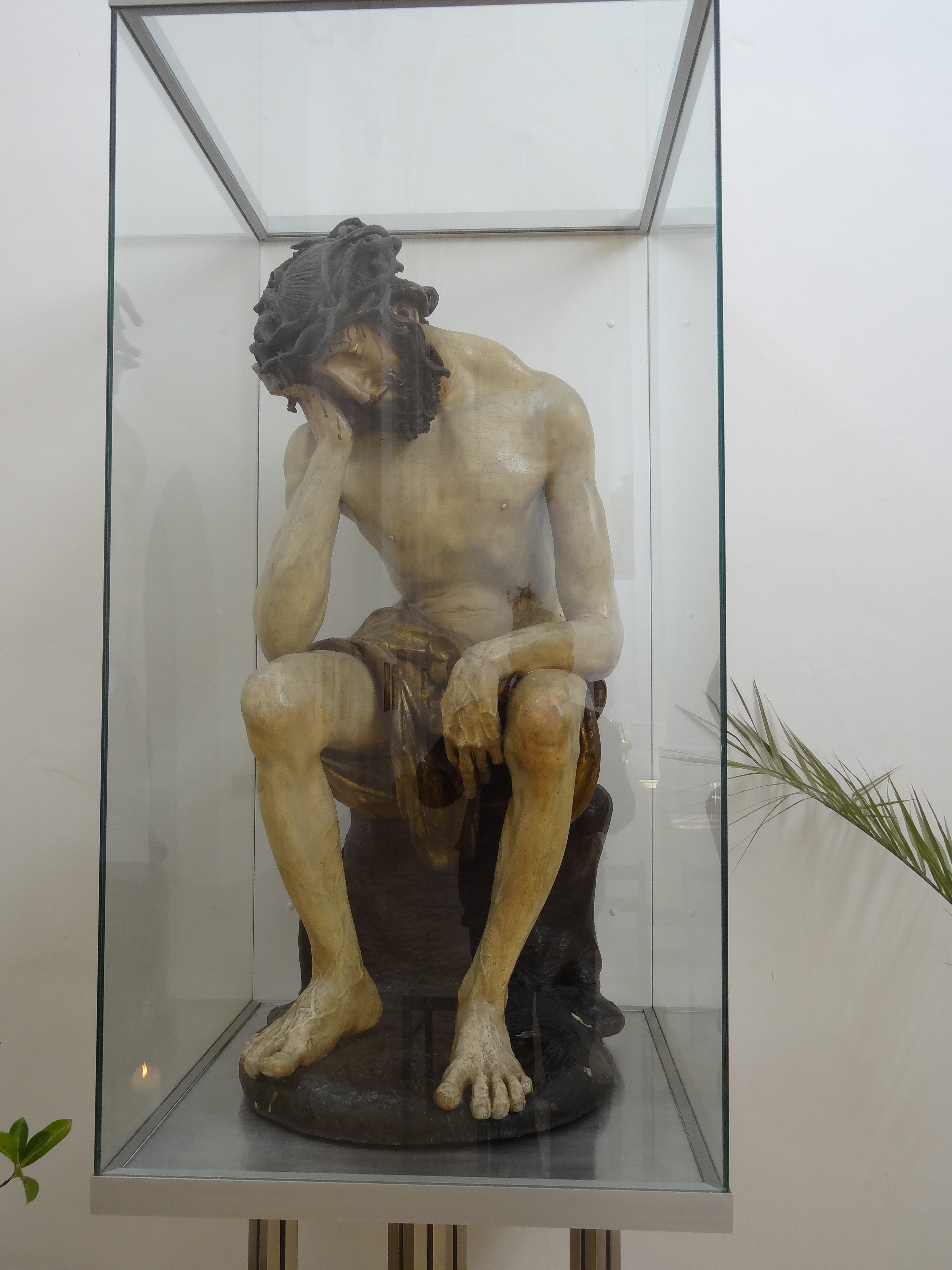 Holzskulptur Christus in der Rast (um 1523) von Hans Leinberger in der Kirche Alt-St. Nikola in Landshut